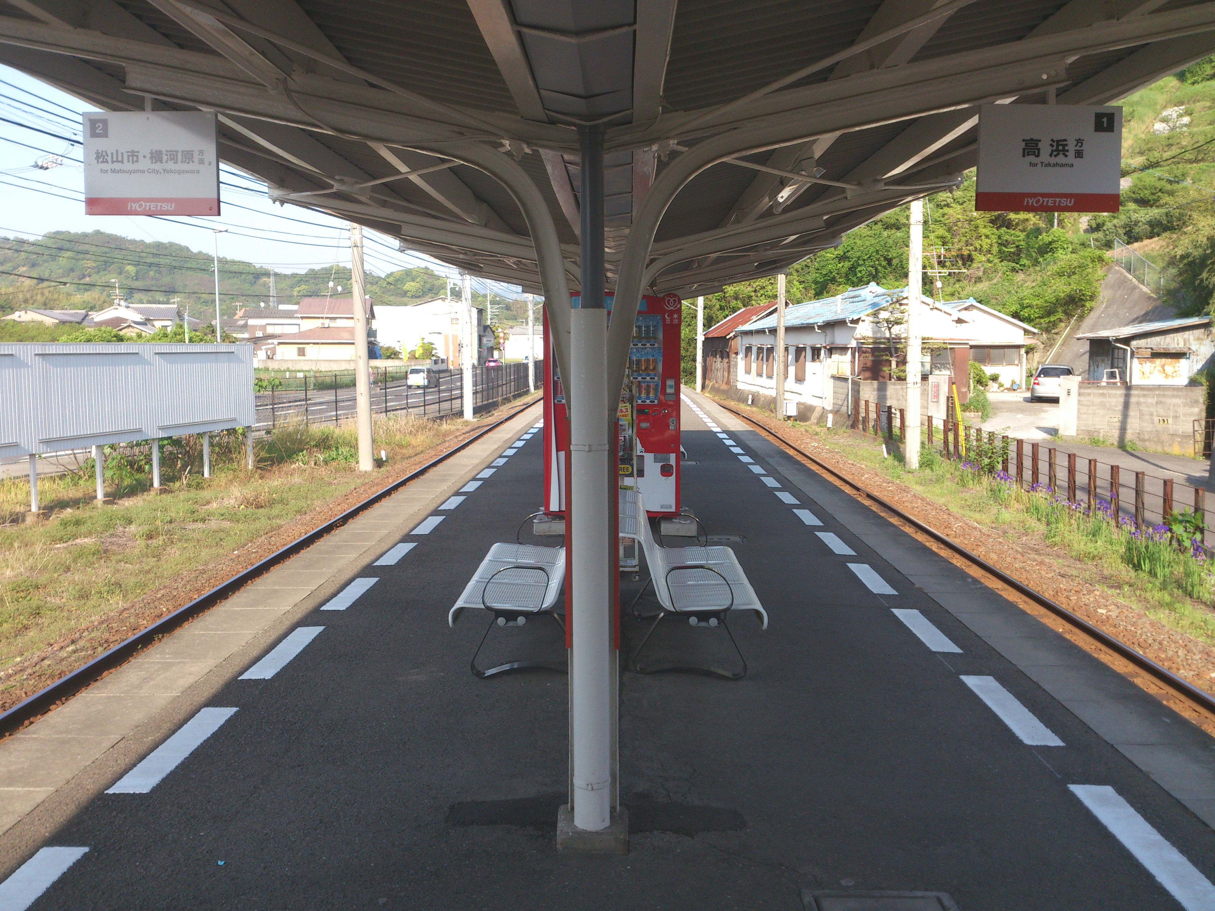 伊予鉄道 港山駅のホームです